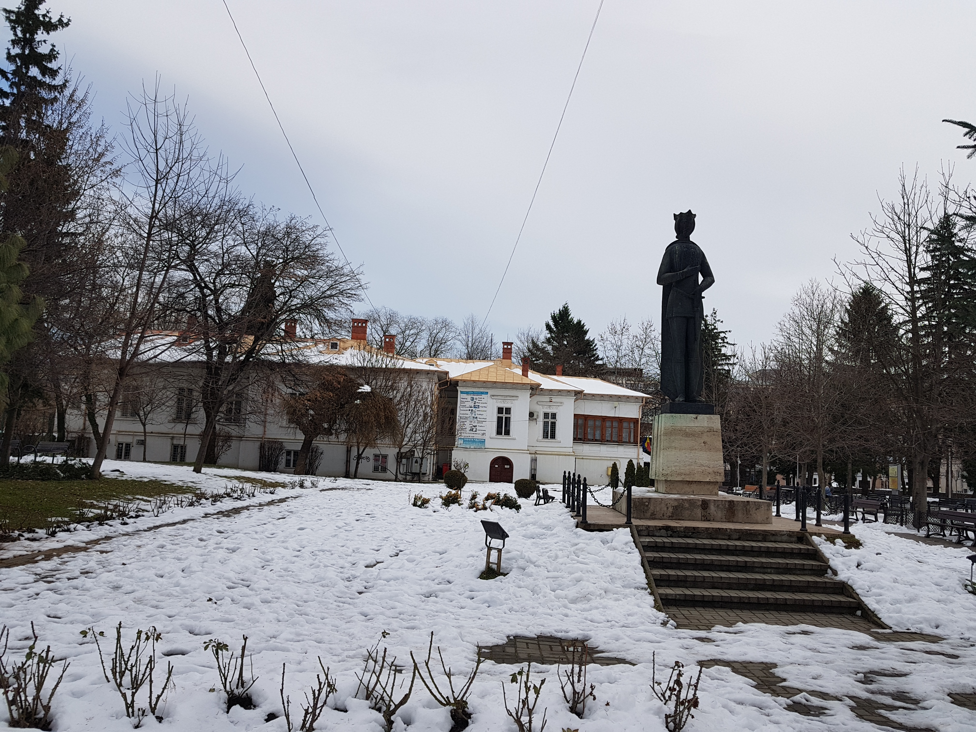 Casa Socoteanu - Lahovary